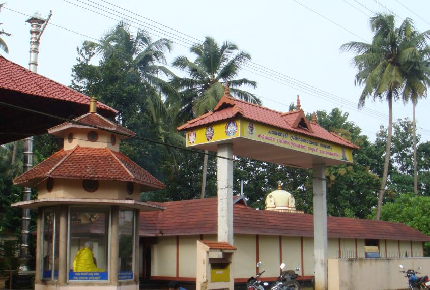 ചാലക്കുടി കൂടപ്പുഴ‍ സുബ്രമണ്യക്ഷേത്രം